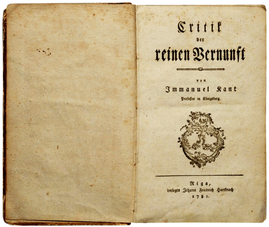 Kant, Immanuel: Kritik der reinen Vernunft. Riga: J. F. Hartknoch 1781, 856 Seiten, Erstdruck.